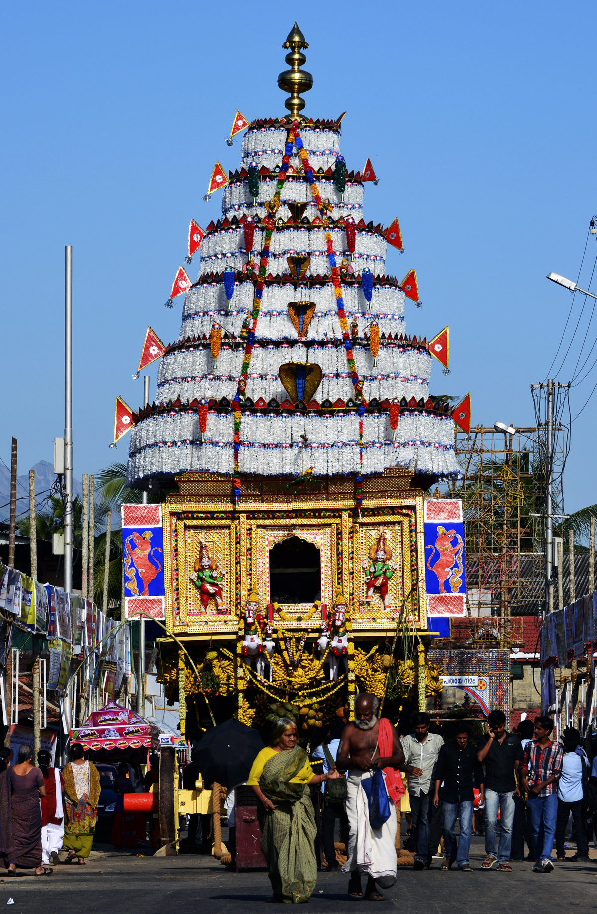 കൽപ്പാത്തി രഥോത്സവം